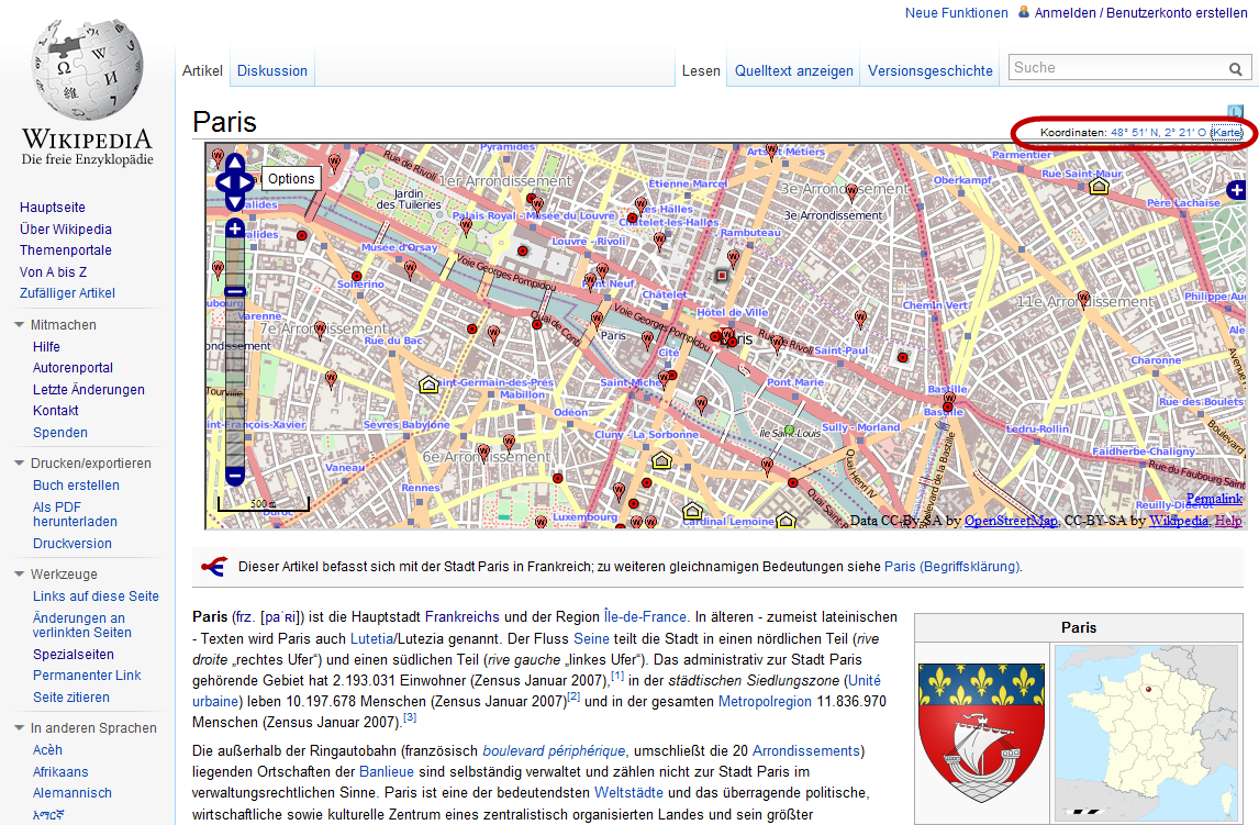 OSM-Gadget: Anwendung mit Karte in einem Artikel Für die Karte von OpenStreetMap, für die Lagekarte, für das Wappen gibt es jeweils unterschiedliche Lizenzen.